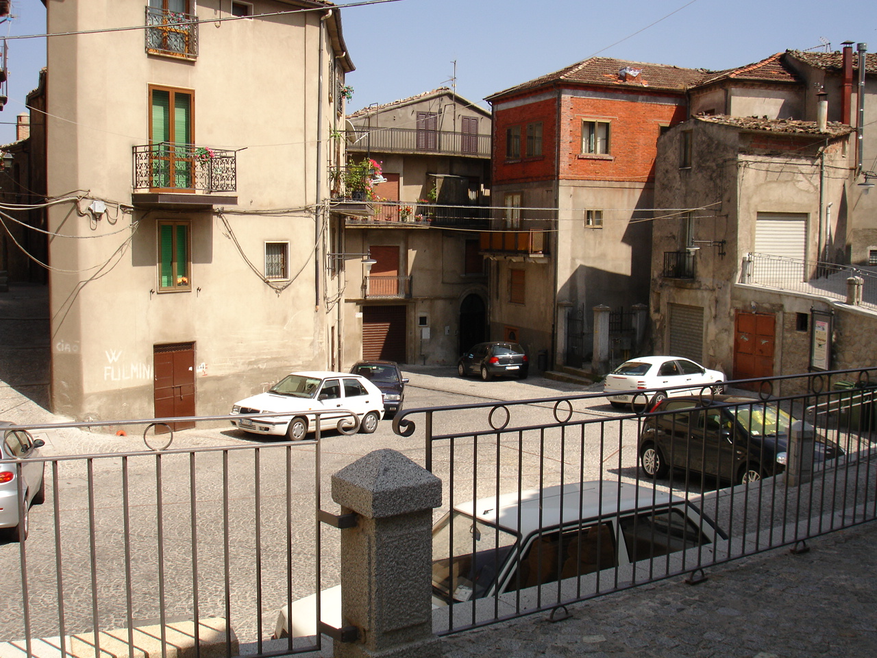 Piazza Funtanella a San Giovanni in Fiore dopo il restauro del 2007. Vista da via Florense